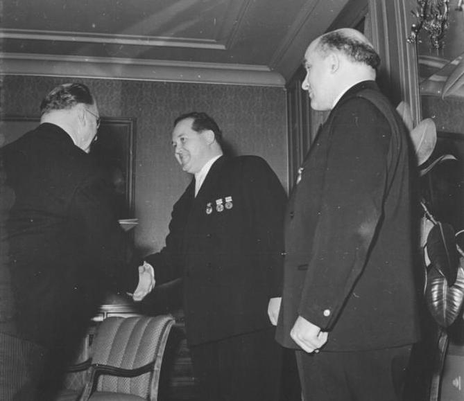 ADN-ZB Junge 10.2.1961 Walter Ulbricht ernannte Botschafter. Der Vorsitzende des Staatsrates der Deutschen Demokratischen Republik, Walter Ulbricht, ernannte den Generaldirektor im Ministerium für Auswärtige Angelegenheiten, Wolfgang Kiesewetter, zum Ausserordentlichen und Bevollmächtigten Botschafter. Gleichzeitig ernannte der Vorsitzende des Staatsrates Herrn Karl Speiser zum Ausserordentlichen und Bevollmächtigten Botschafter in der Mongolischen Volksrepublik und überreichte ihm das Beglaubigungsschreiben. UBz: Walter Ulbricht beglückwünscht Wolfgang Kiesewetter zu seiner Ernennung. Rechts außen Karl Speiser.